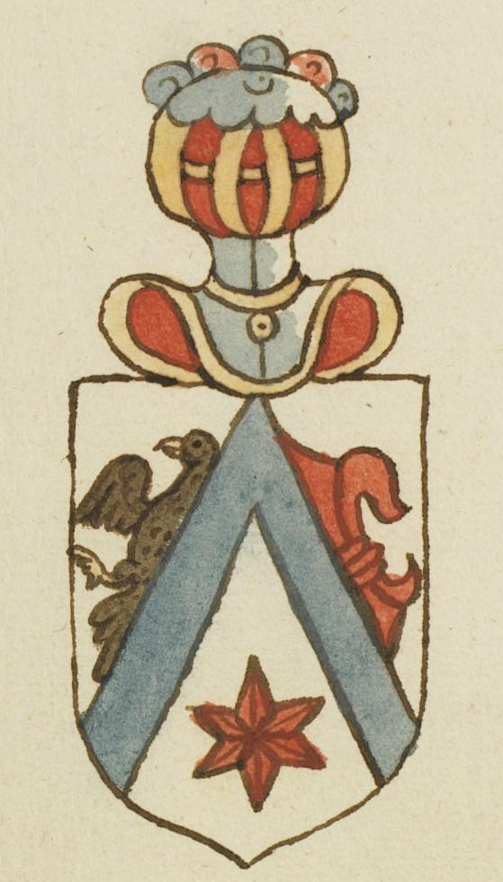 Illustrasjon hentet fra et privatarkiv i Nasjonalbiblioteket med tittelen "Insignia quædam virorum illustrium in Norvegia quodam habitantium" av Iver Nielssøn Hirtzholm.